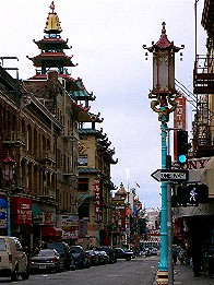 Chinatown de San Francisco, Californie Auteur : Utilisateur:Urban J'ai pris cette photo au cours d'un voyage en Californie en avril 2004.